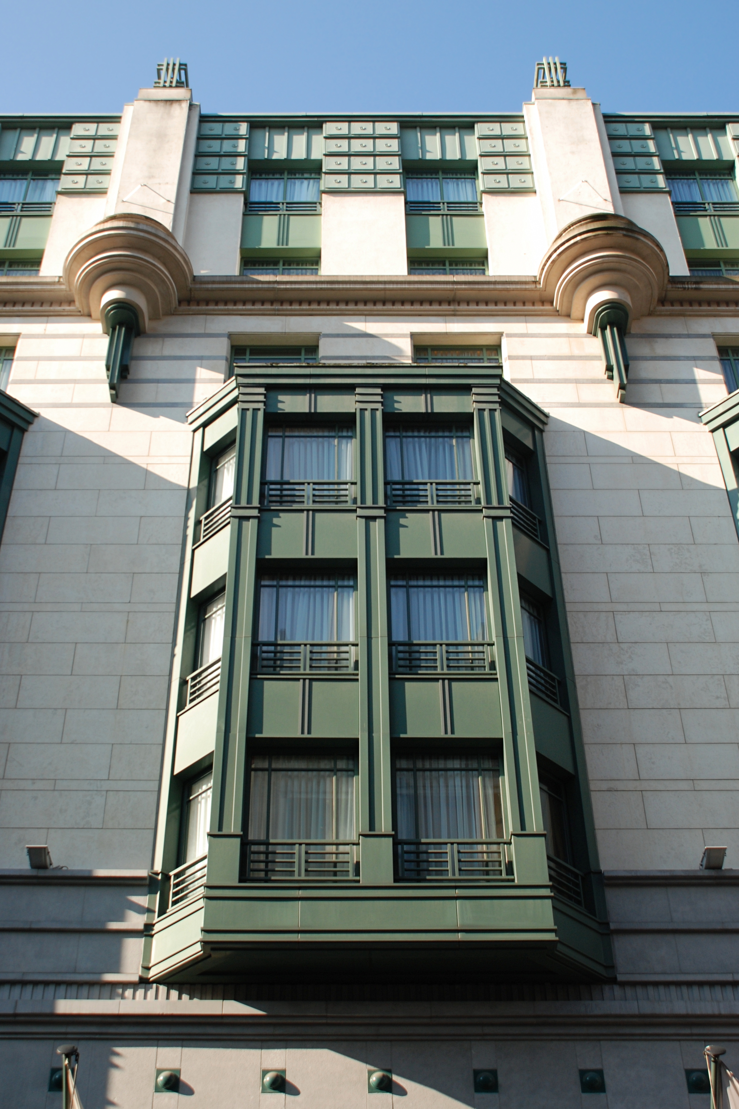 Belgique - Bruxelles - Hôtel Radisson SAS (Architecture postmoderne en Belgique - Atelier d'Art Urbain)